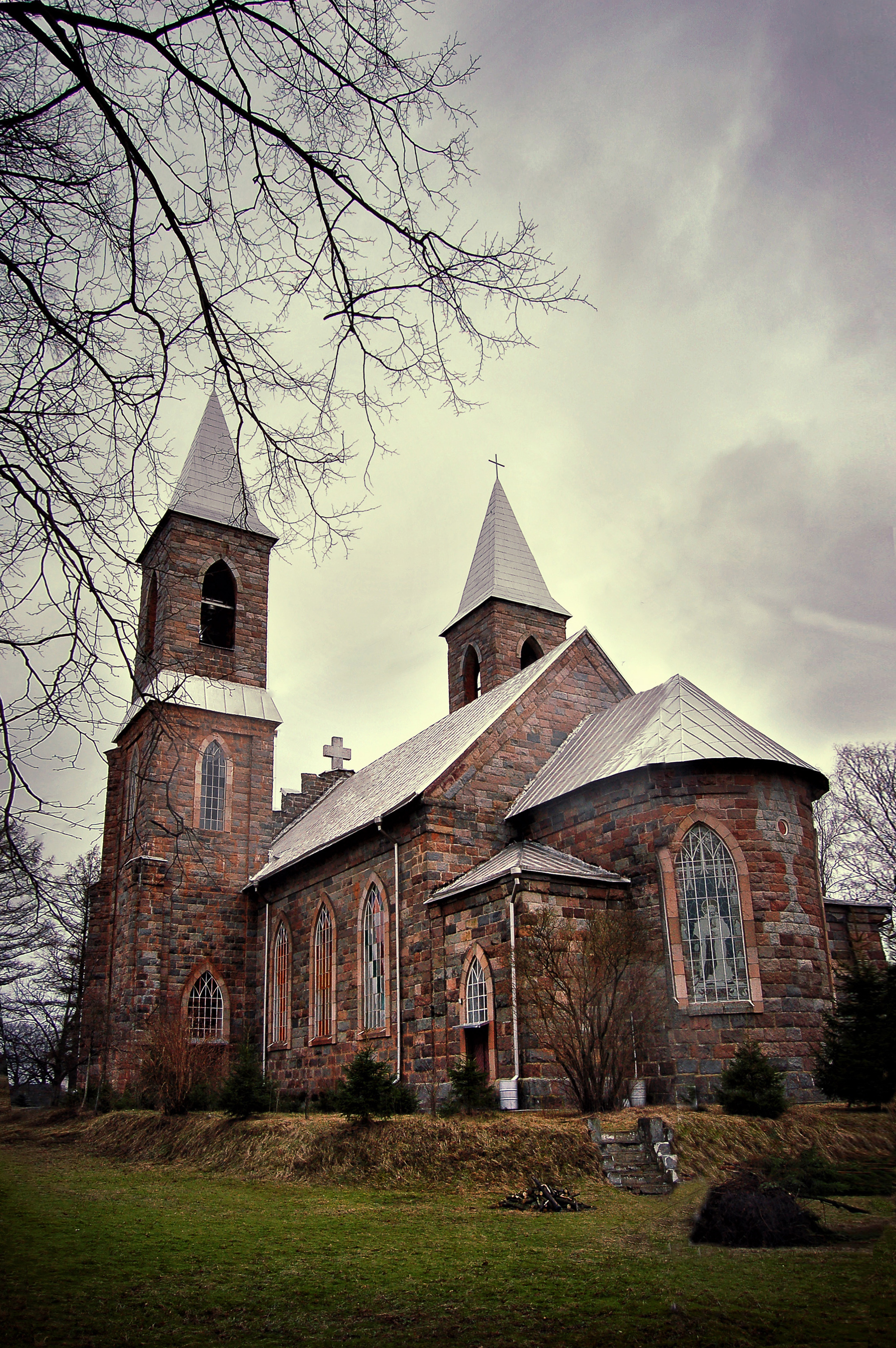 Беларуская (тарашкевіца): Касьцёл Сьвятога Юзафа. в. Рубяжэвічы This is a photo of Belarusian heritage monument. Reference number: 612Г000621 ( WLM)